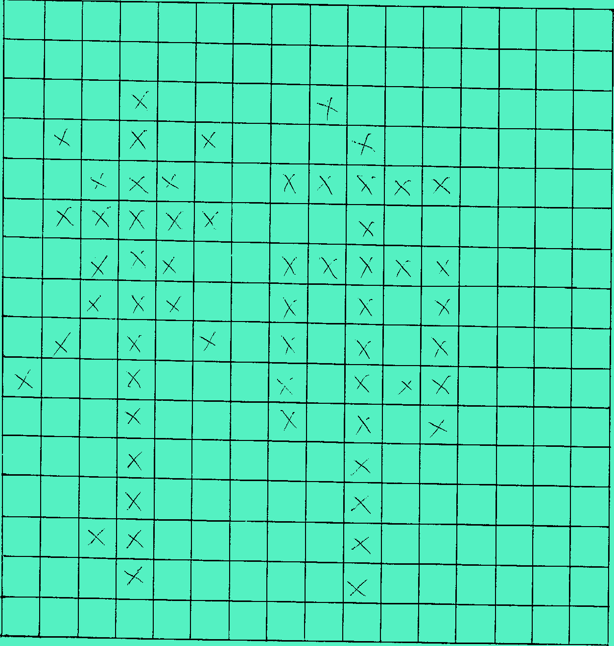 1993年我在惠普公司實習時，隔鄰部門為客戶的系統建立造字檔案時用的表格。基本上，每一個中文字都會採用獨立的一張表，就是一個放大了的字型。然後再用人手把每張表格編碼，用人手把點陣輸入系統。本圖由石添小草掃描。